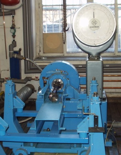 Motorenprüfstand mit Schenck-Wirbelstrombremse